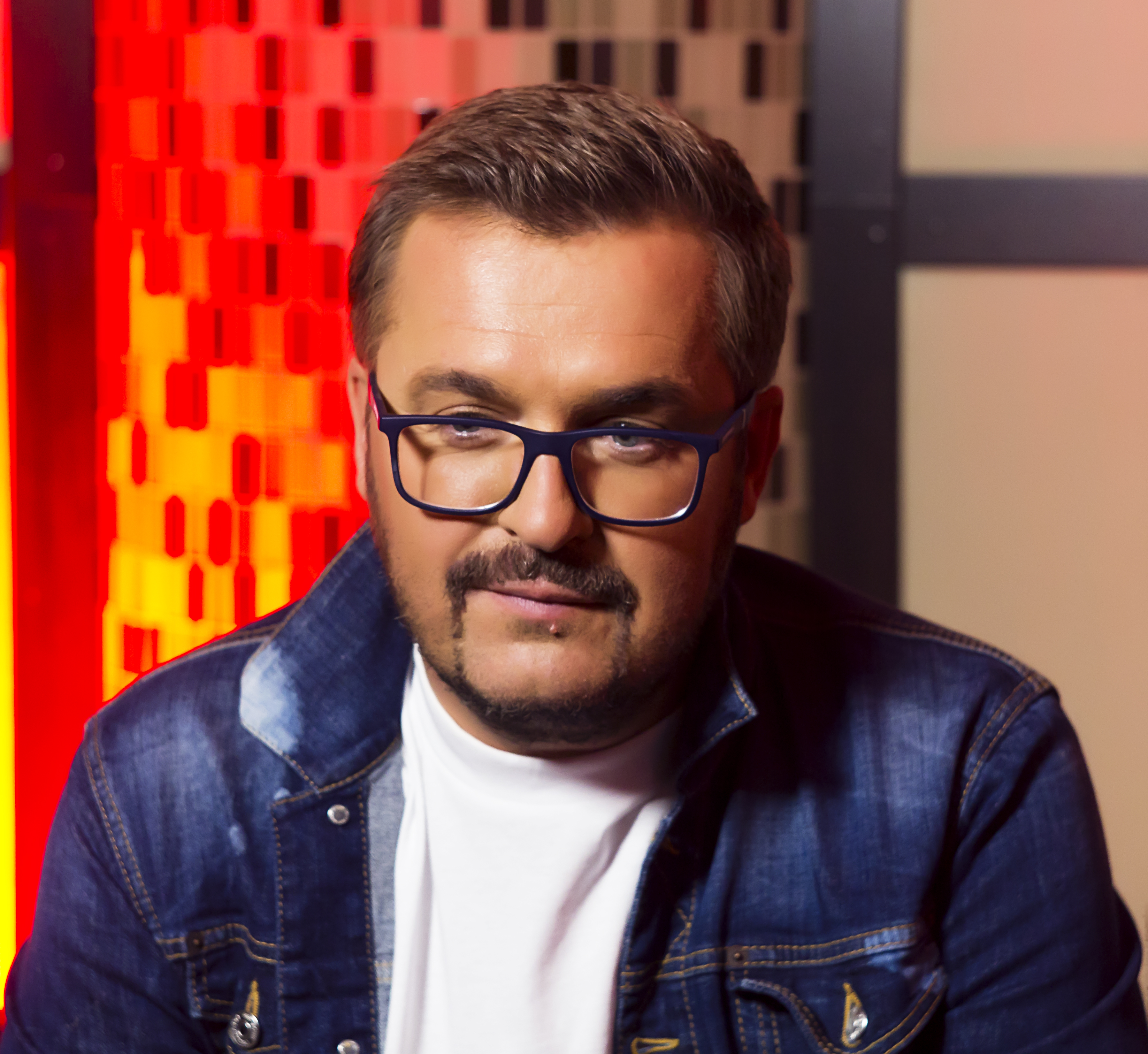 Александр Пономарев